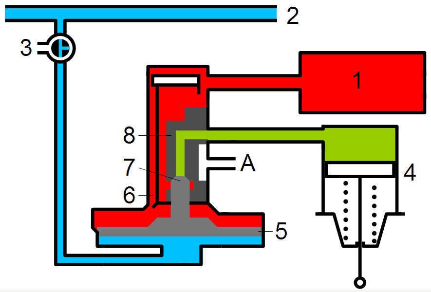 Steuerventil einer einlösigen Druckluftbremse: Abschlussstellung 1 Hilfsluftbehälter 2 Hauptluftleitung 3 Ausschalthahn 4 Bremszylinder 5 Steuerkolben 6 Füllnut 7 Abstufungsventil 8 Schieber A Luftauslass ins Freie